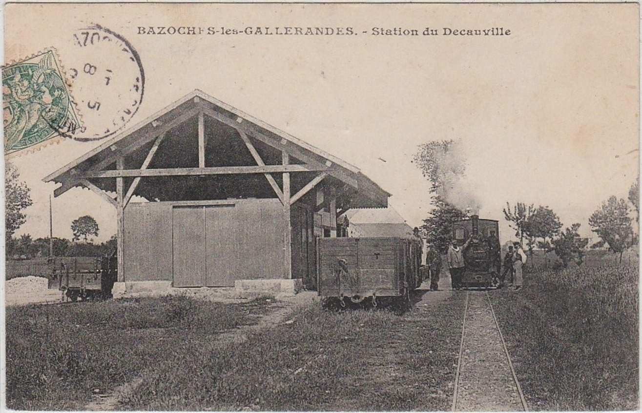 Bazoches-les-Gallerandes - Station du Decauville